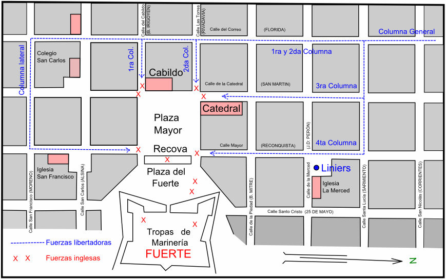 Primera Invasión Inglesa a Buenos Aires (1806). Plano del movimiento de la fuerzas Libertadoras al mando de Santiago de Liniers. La información para el presente plano esta tomada del libro "Gran Enciclopedia Argentina". Autor: Diego Abad de Santillán. Ediar Soc Anon, de Editores. 1966, Buenos Aires, Argentina. La nomenclatura de algunas de las calles ha sido modificada en base a información del libro "Buenos Aires: Historia de las calles y sus nombres" de Vicente Osvaldo Cutolo. Editorial Elche. Buenos Aires, 1994. Vol I y II. ISBN 950-99212-03.